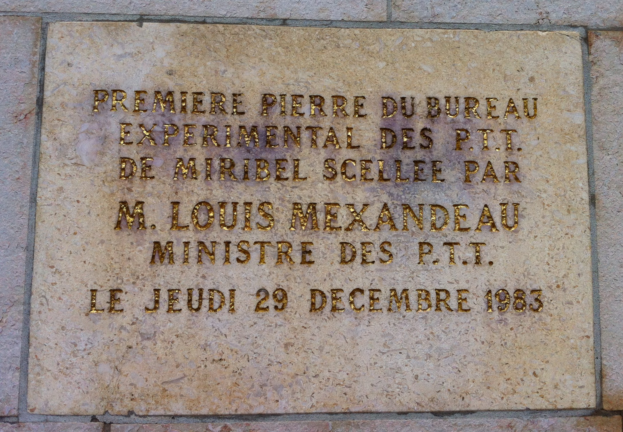 Plaque inaugurale de la poste de Miribel : 1983, en présence de Louis Méxandeau, alors ministre des Postes.